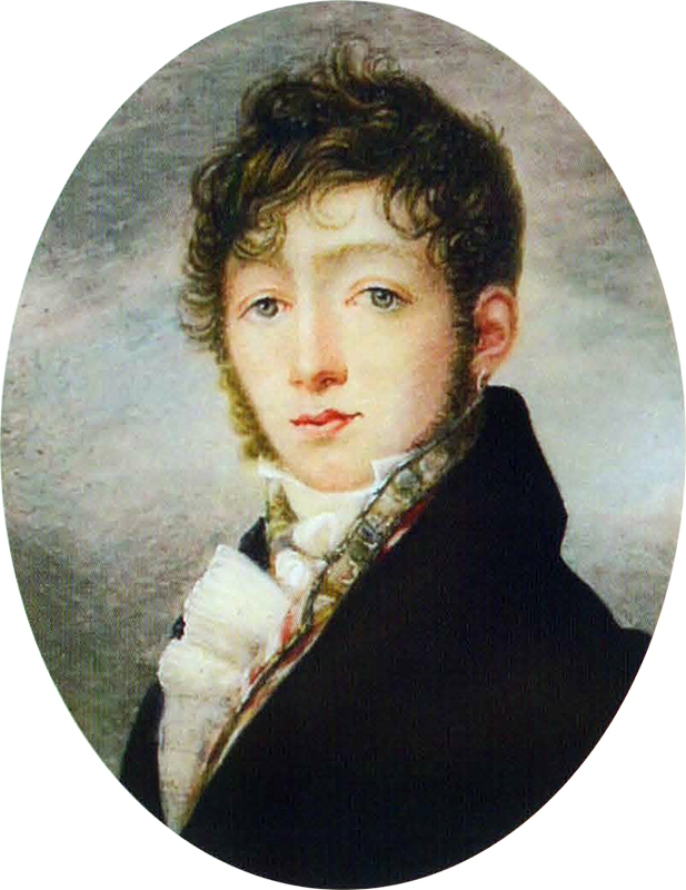 Беларуская (тарашкевіца): Партрэт Дамініка Гераніма Радзівіла (Daminik Hieranim Radzivił)